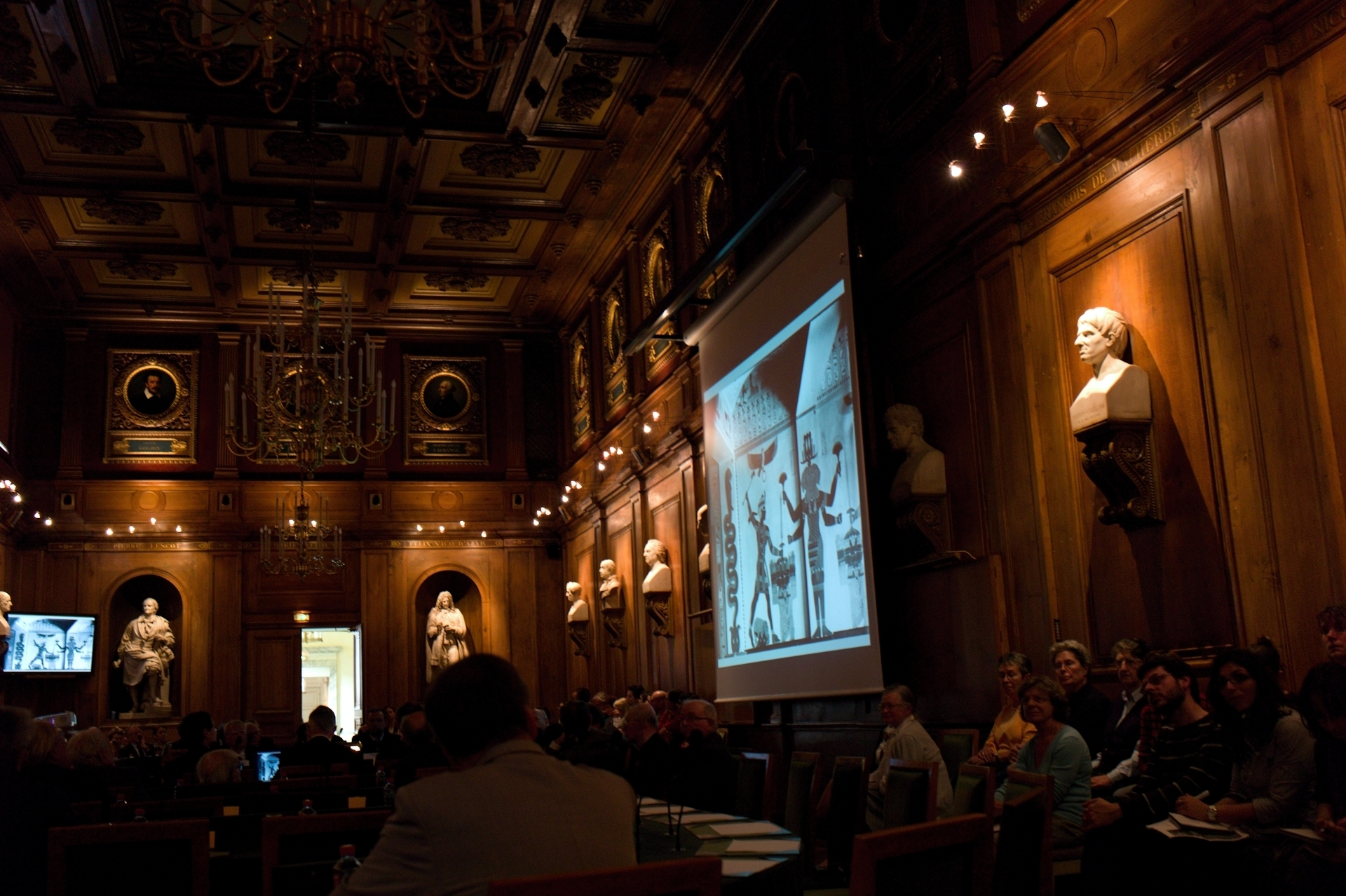 Institut de France, Paris. Grande salle des séances.